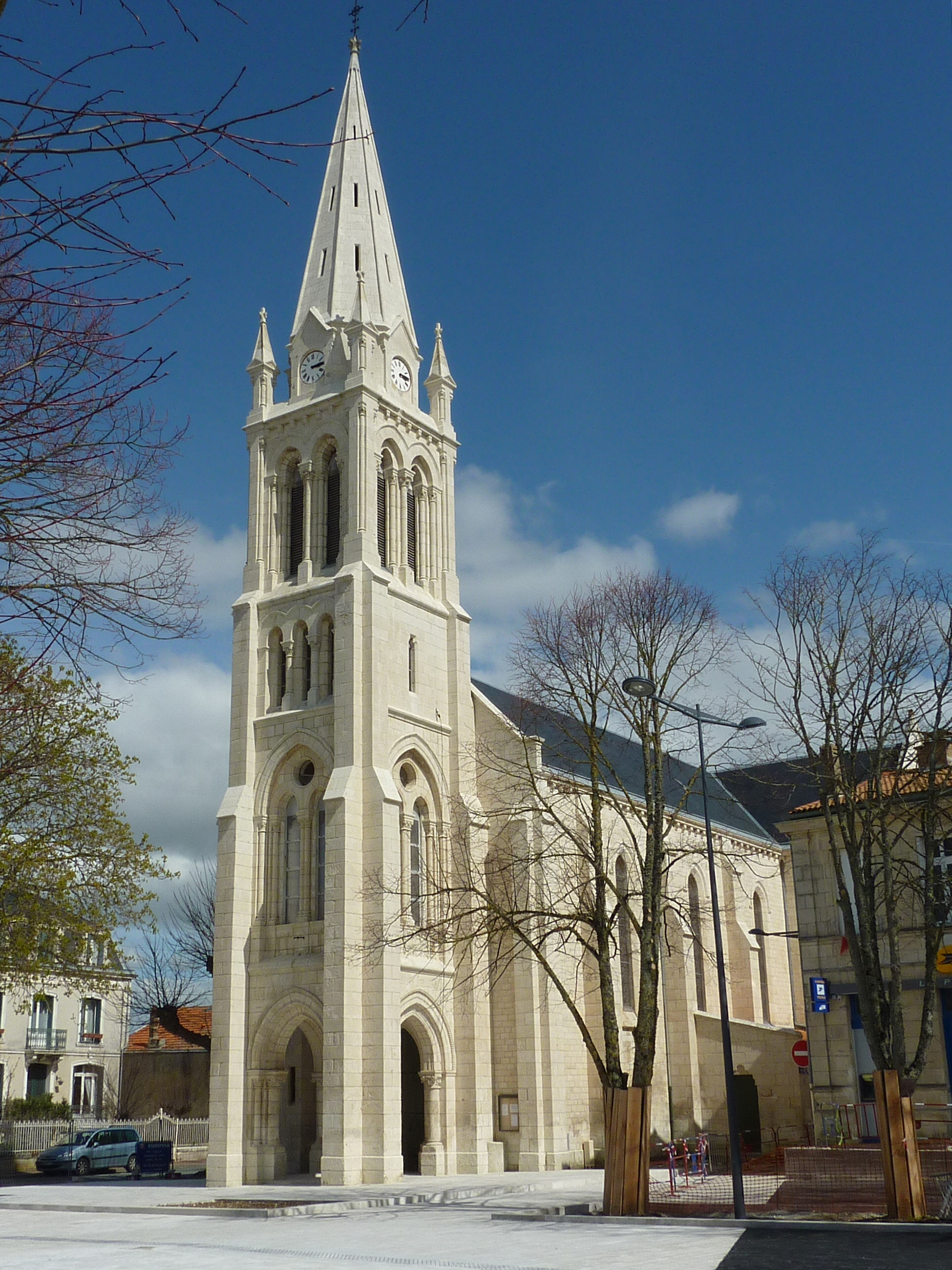 Eglise Saint-Gaudens de Fouras en Charente Maritime, France